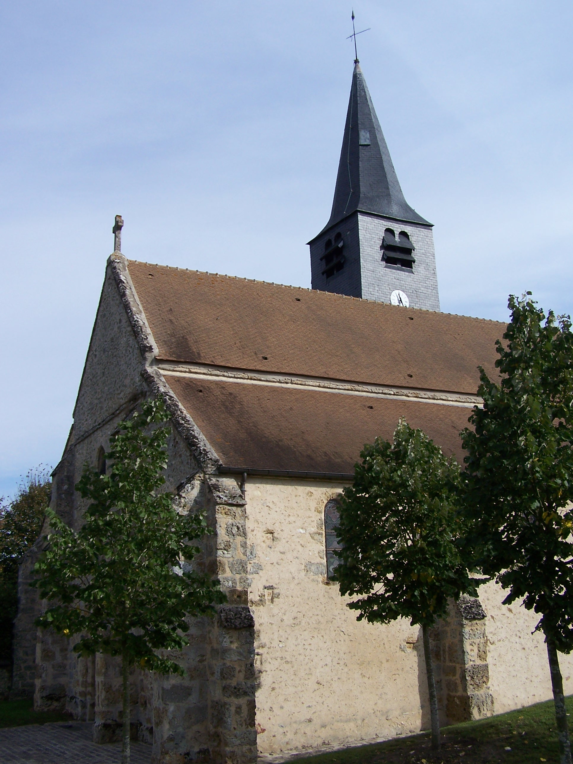 Église de Senlisse (Yvelines, France)